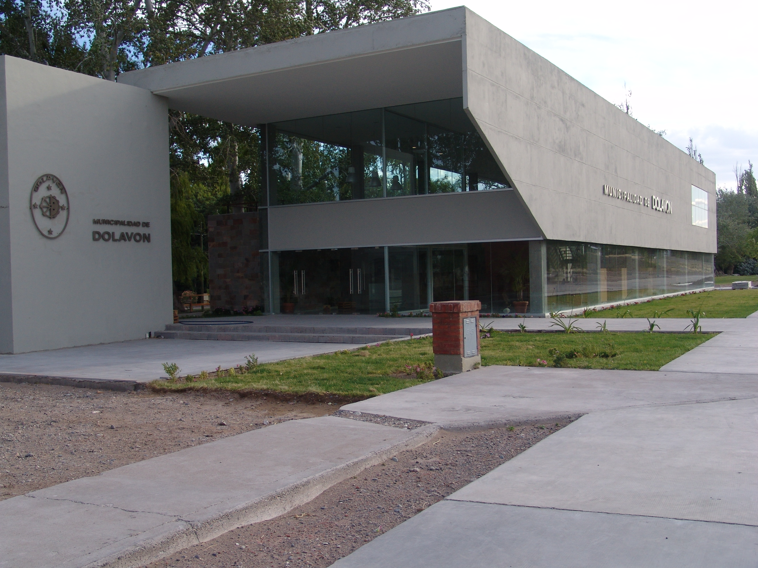 Municipalidad